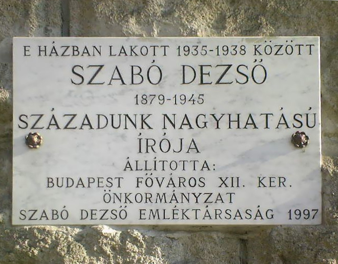 Szabó Dezső-emléktábla. Budapest XII. kerület